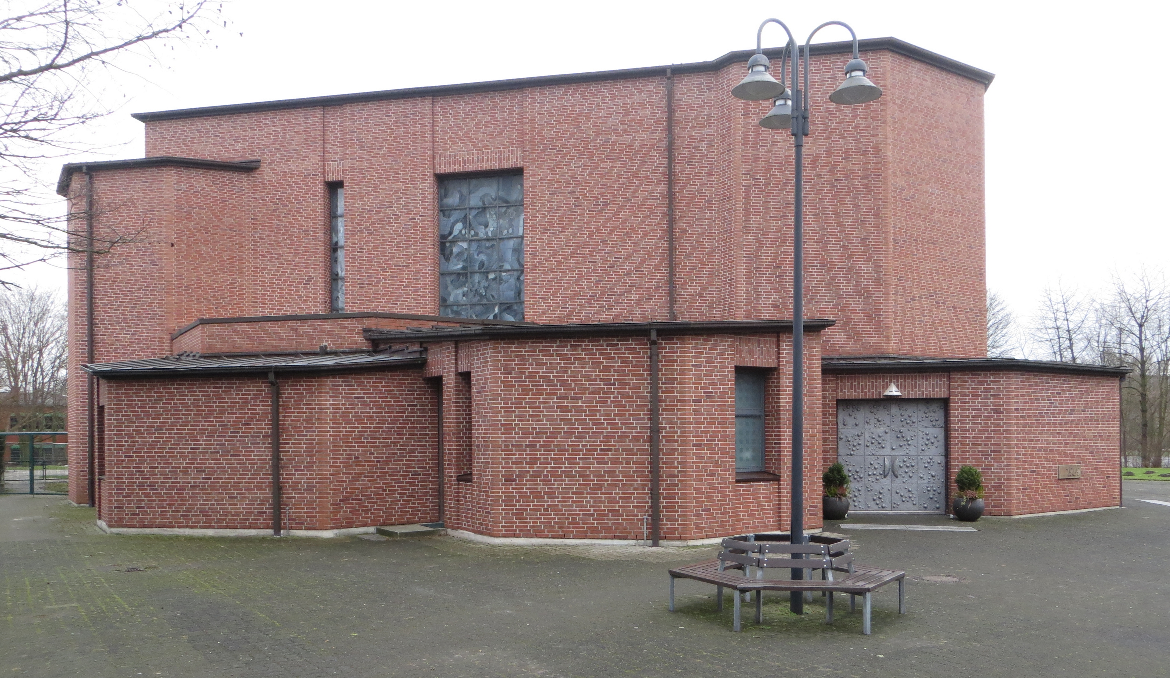 Neue Kirche St. Ewaldi in Dortmund Aplerbeck